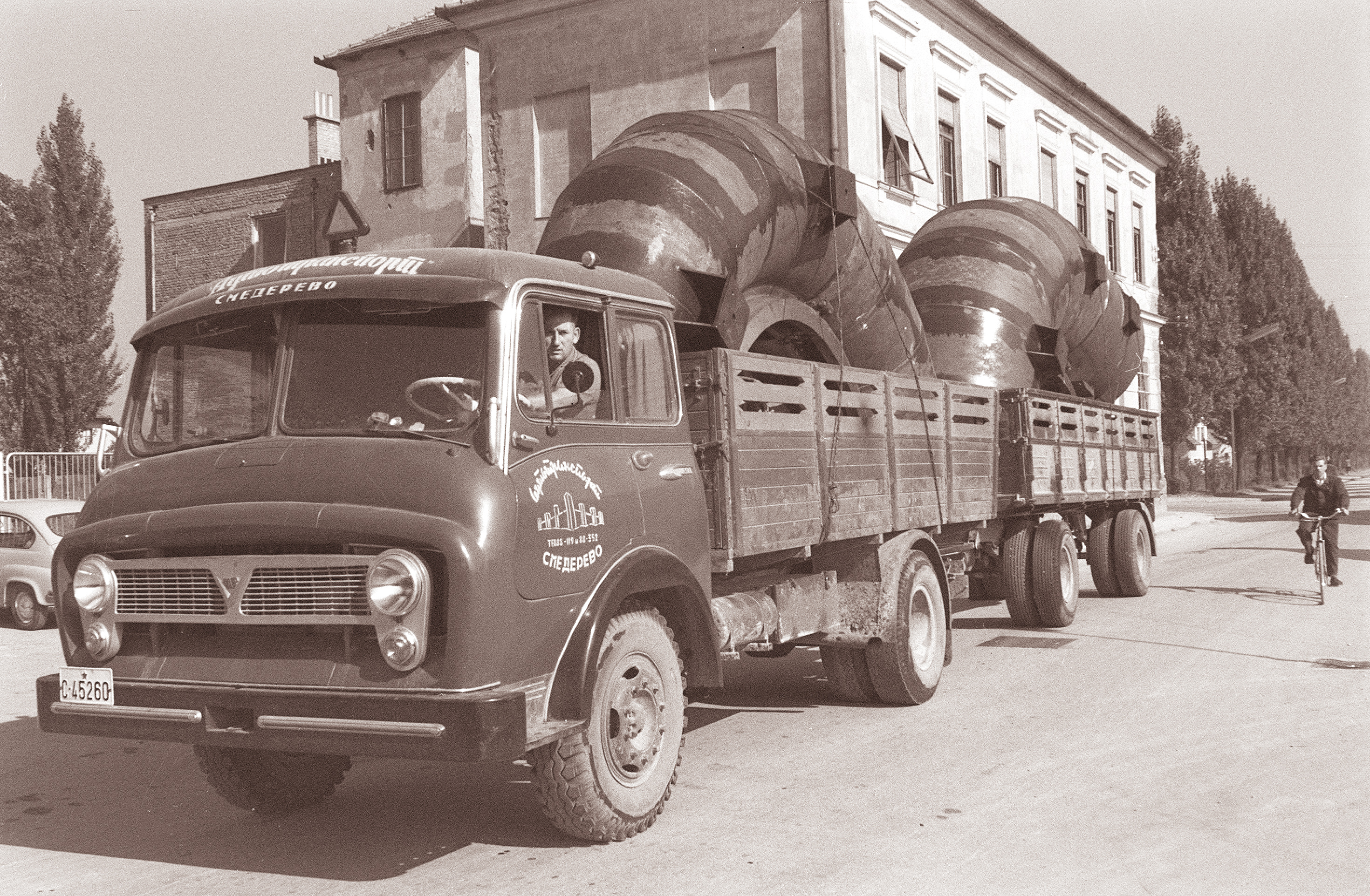 Metalna - prevoz posebnega žerjava iz Metalne v Ljubljano za mednarodni sejem gradbeništva